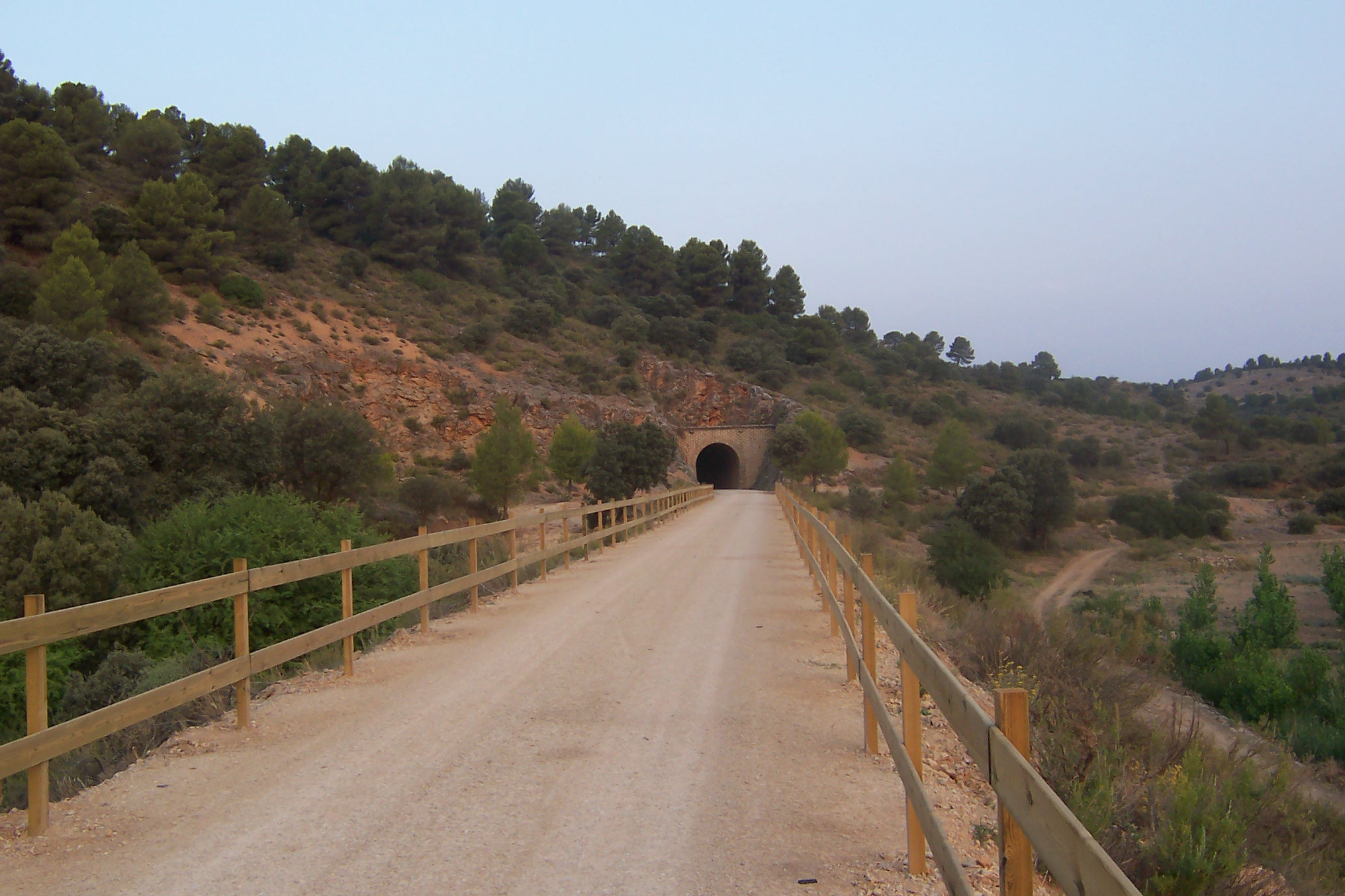 Vía verde Sierra de Alcaraz cerca de El Jardín (Albacete).